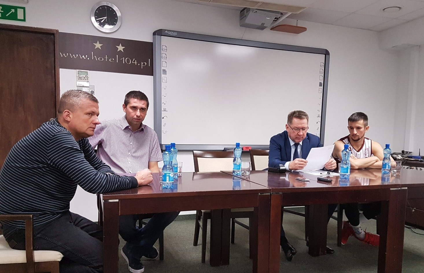 Stargard, 11.11.2017. Konferencja prasowa po meczu z Notecią